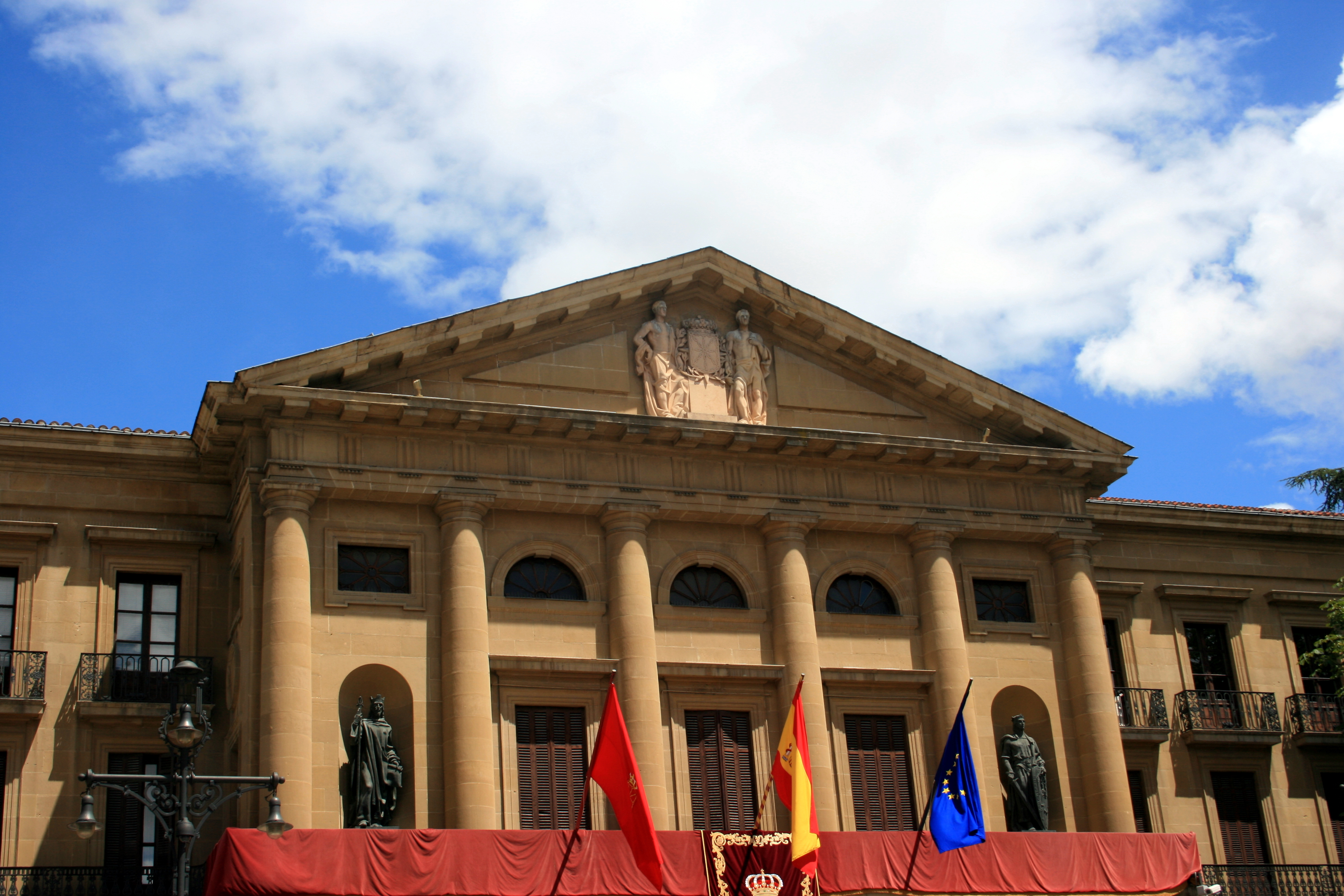 Pamplona 5